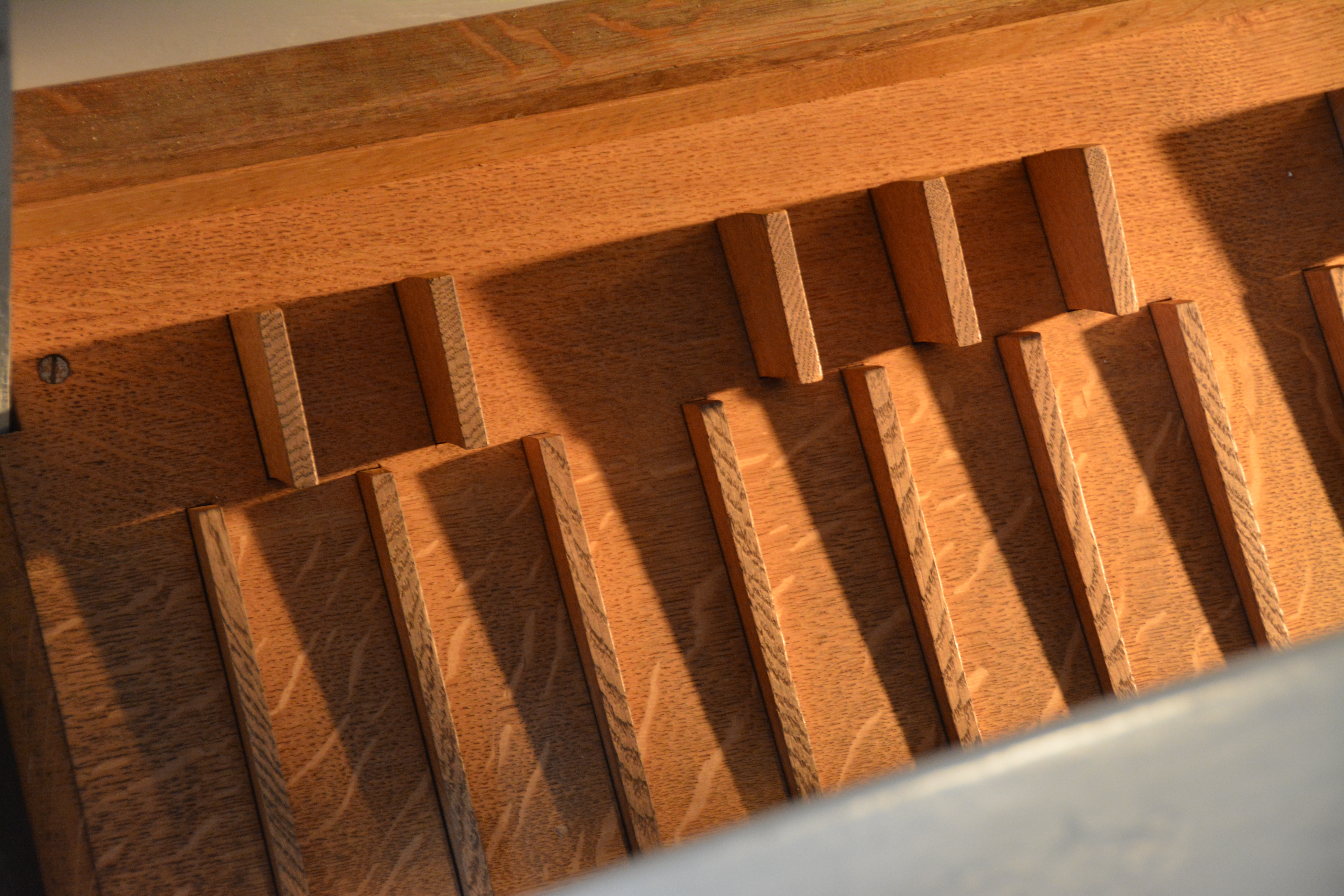 Das sogenannte "Messerrücken-Pedal" der Stapelmoorer reformierten Kirche